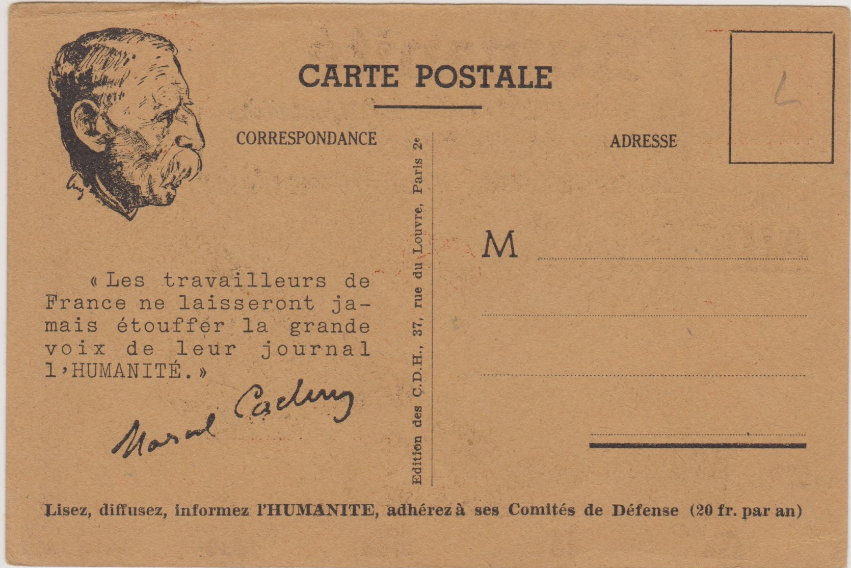 Carte postale (verso) émise et vendue par les Comités de défense de l'Humanité (CDH) en 1948 en soutien au journal.